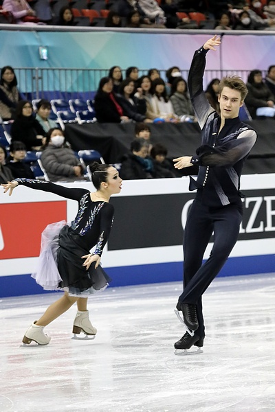 Софья Полищук / Александр Вахнов (Россия) на финале юниорского Гран-при 2017-2018